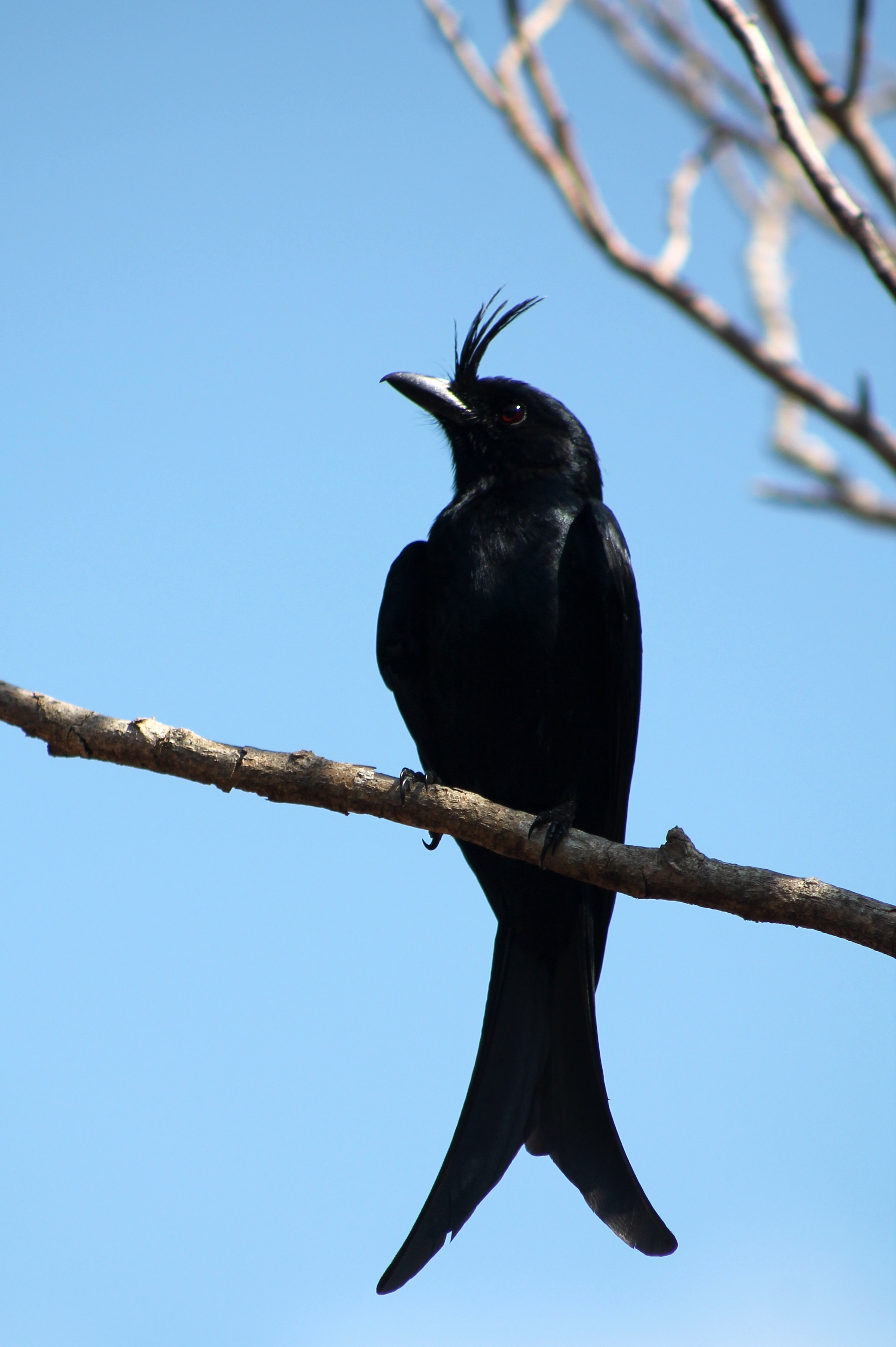 Kuifdrongo in Kirindy